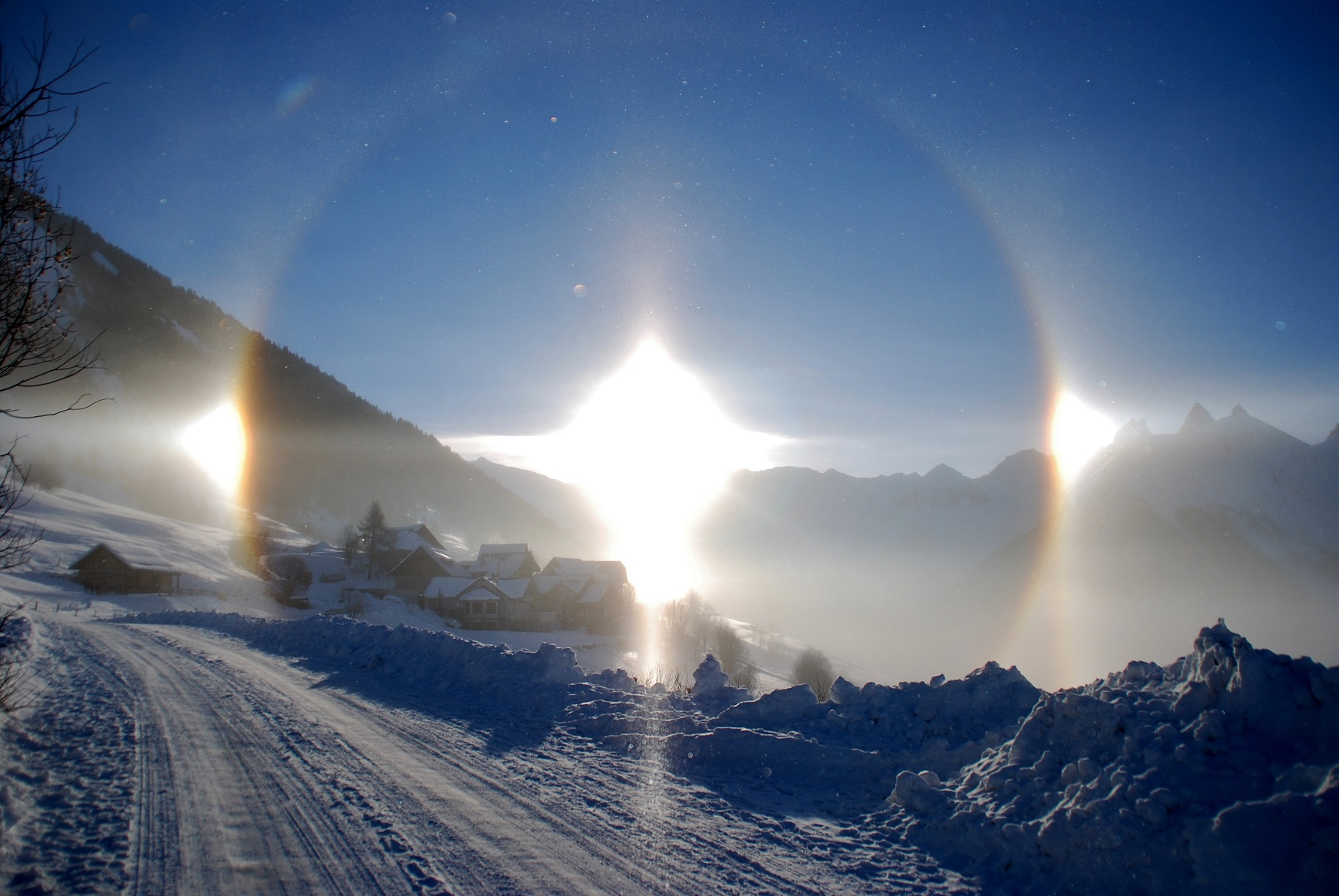 Parhélie photagraphié par Roland LAMBOT le 8 février 2015 à Saint Jean d'Arves (Savoie) FRANCE